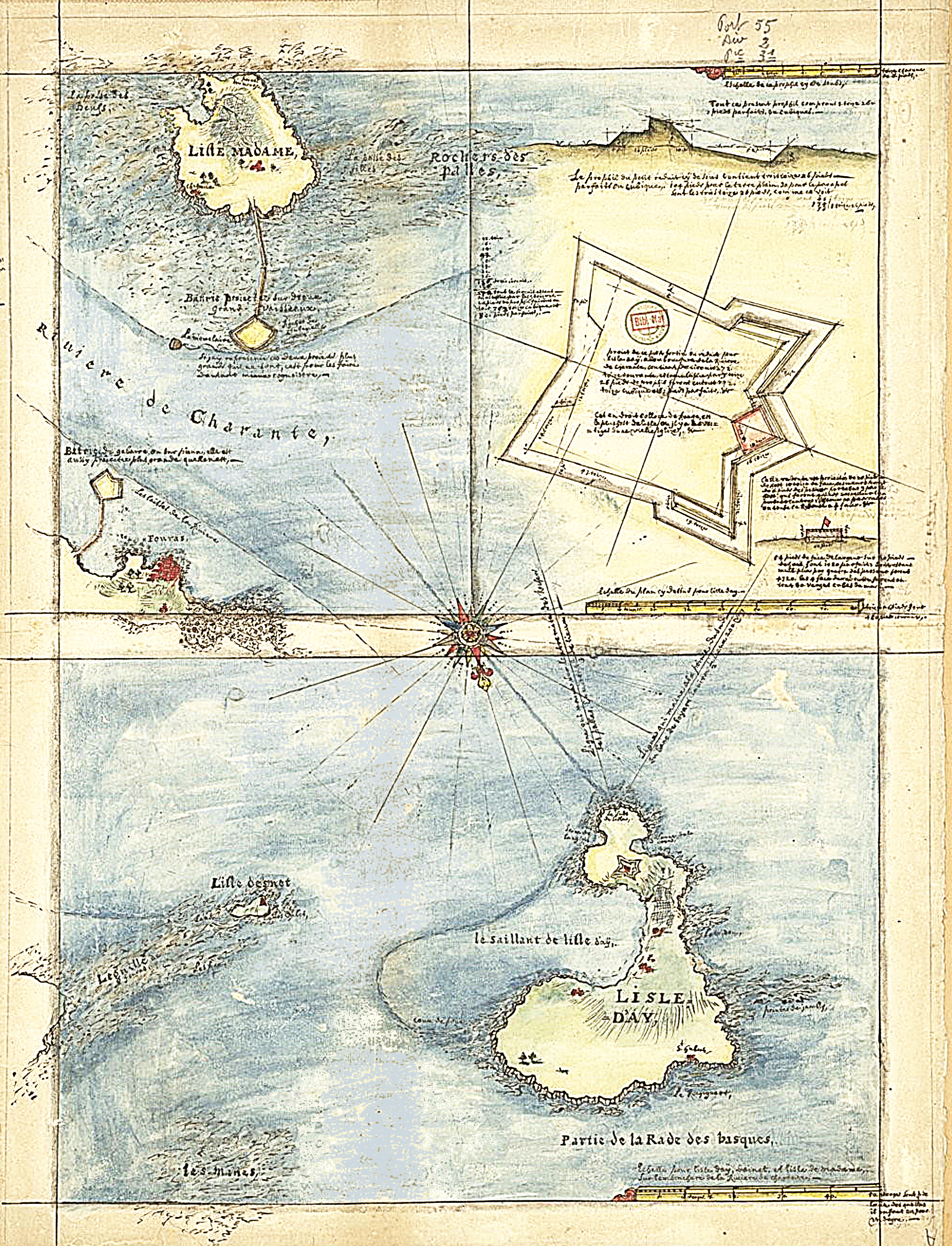 La Favolière (ingénieur).- L'île d'Aix en 1672 avec le plan des fortifications